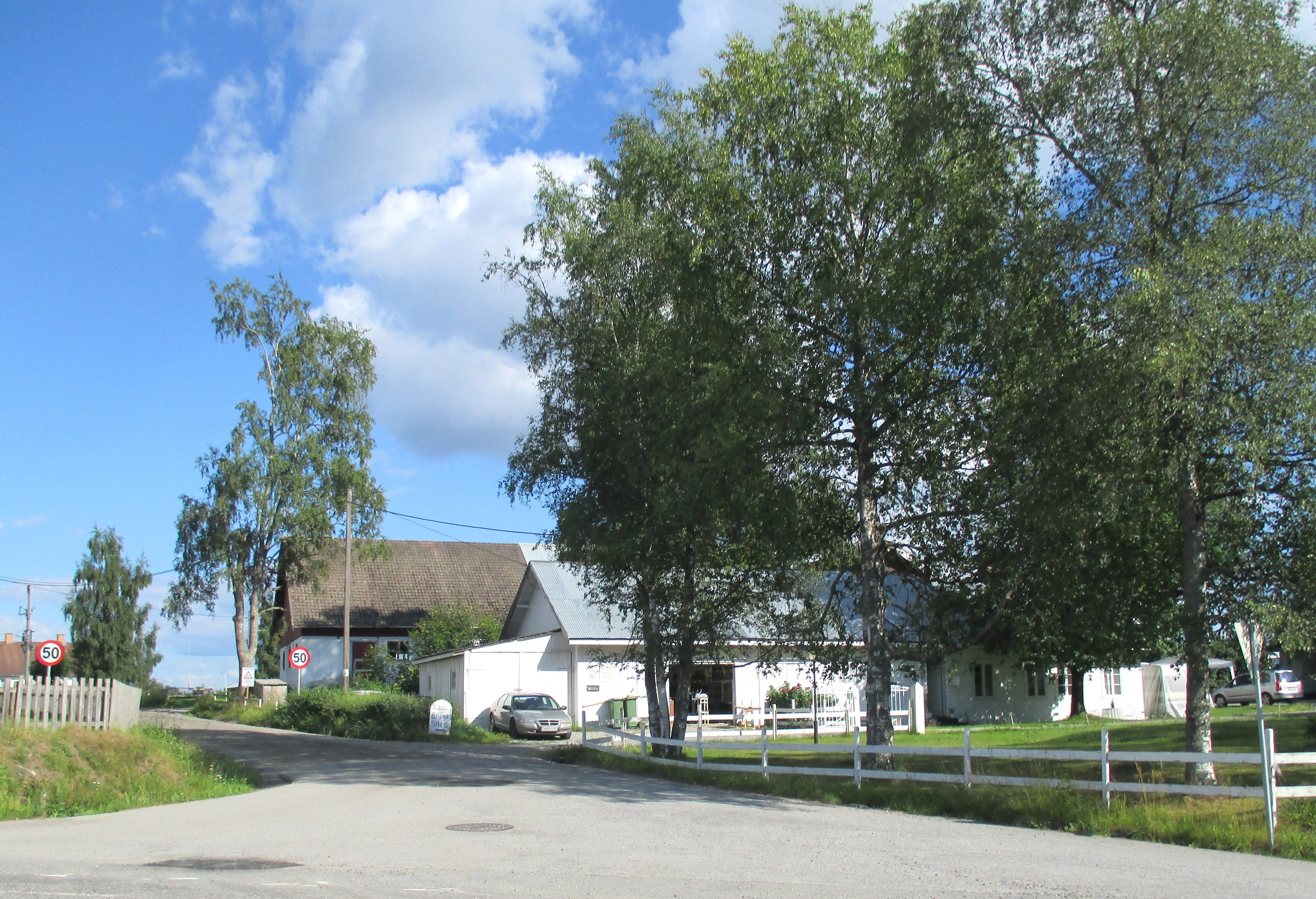 Engervegen (fylkesvei 529) går østover fra Nannestad kirke.